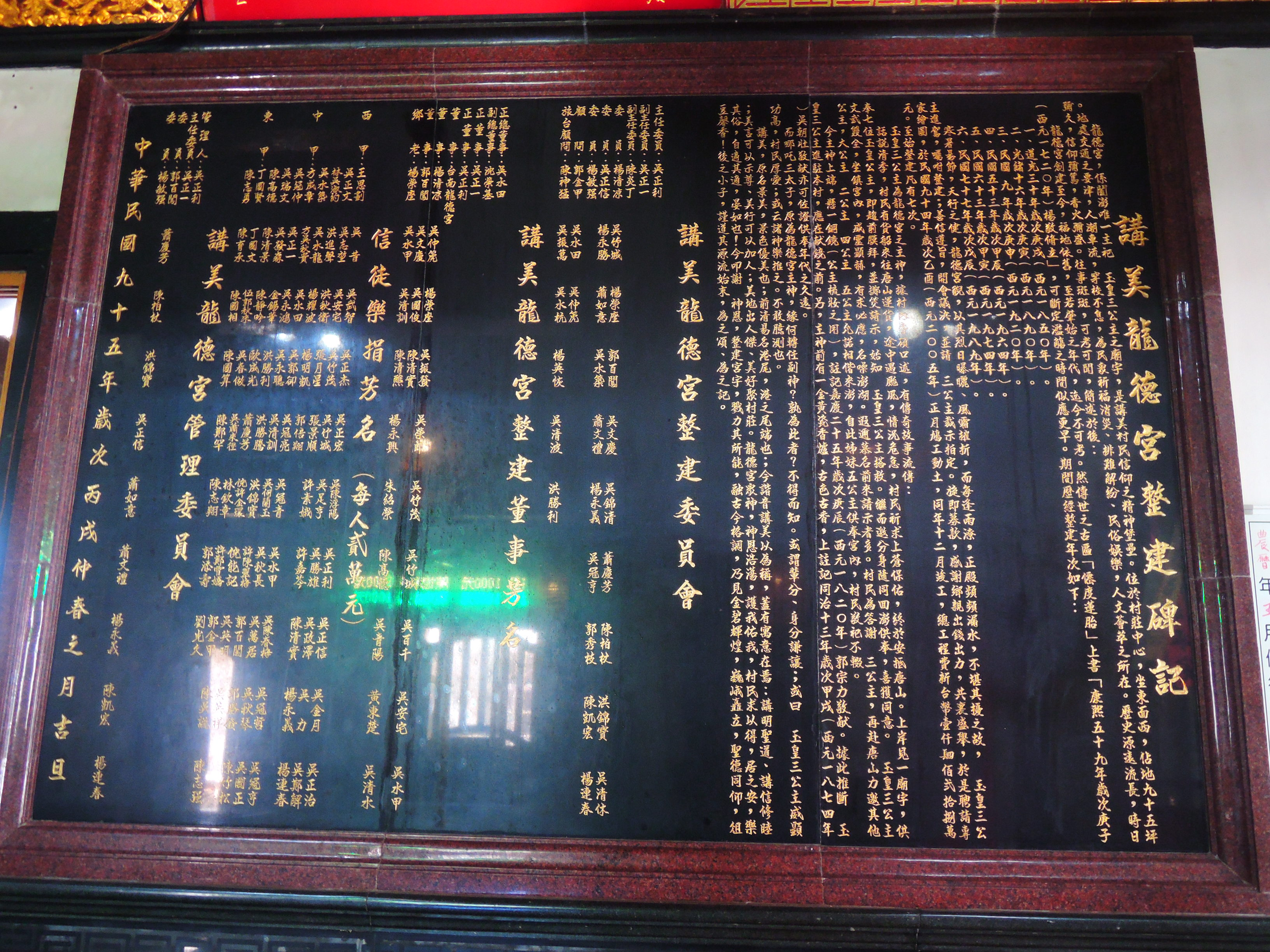 澎湖白沙講美村公廟，主祀玉皇公主。